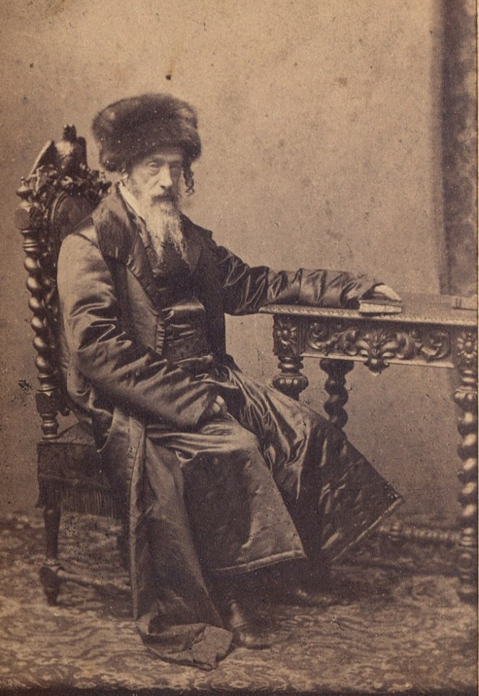 rabin Dob Ber Meisels (Dow Ber Meisels)